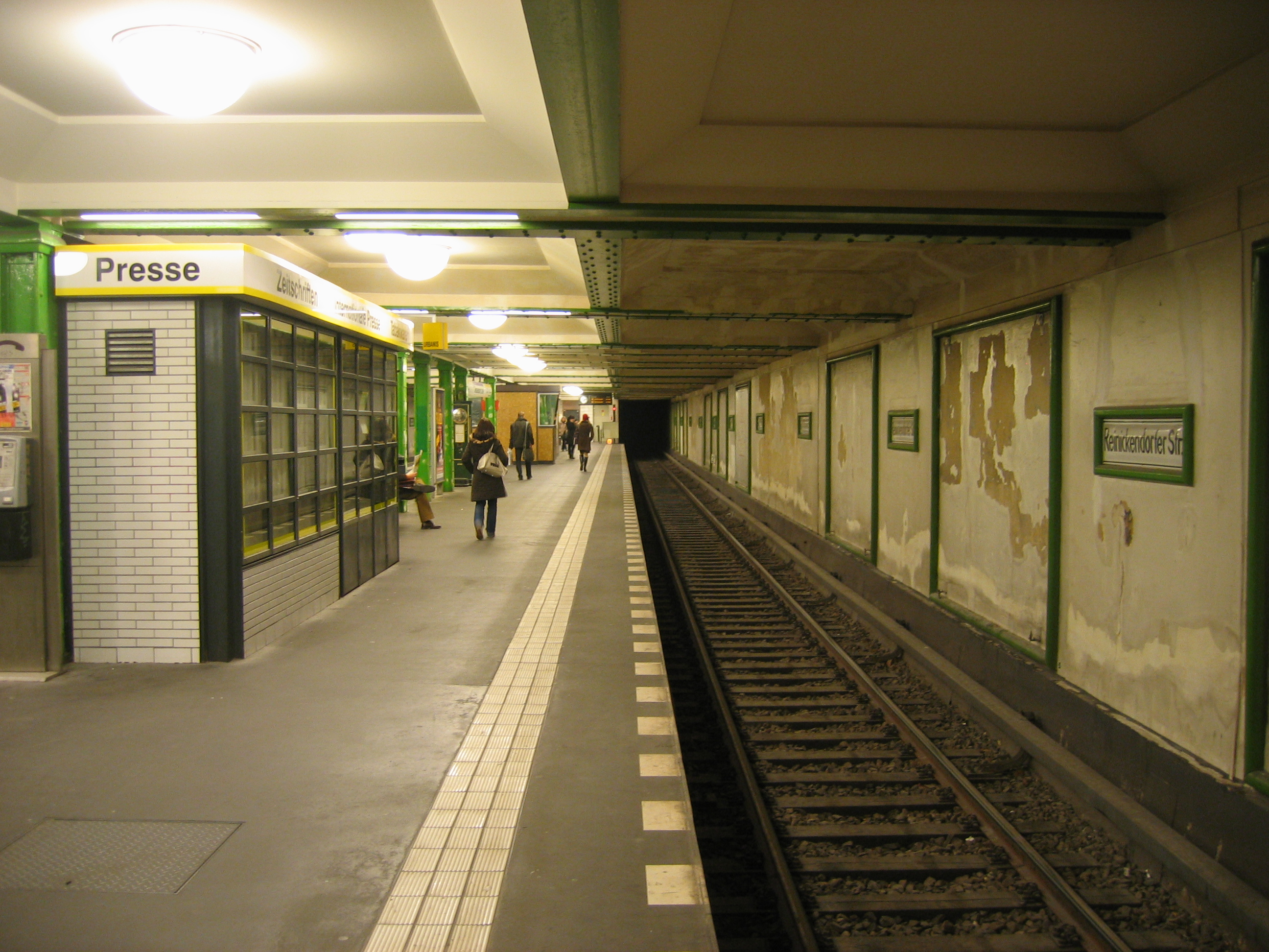 U-Bahnhof Reinickendorfer Straße, Berlin